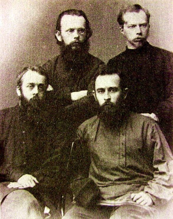 Толстовцы: И. М. Трегубов, И. И. Горбунов-Посадов (стоят), П. И. Бирюков, Е. И. Попов (сидят)